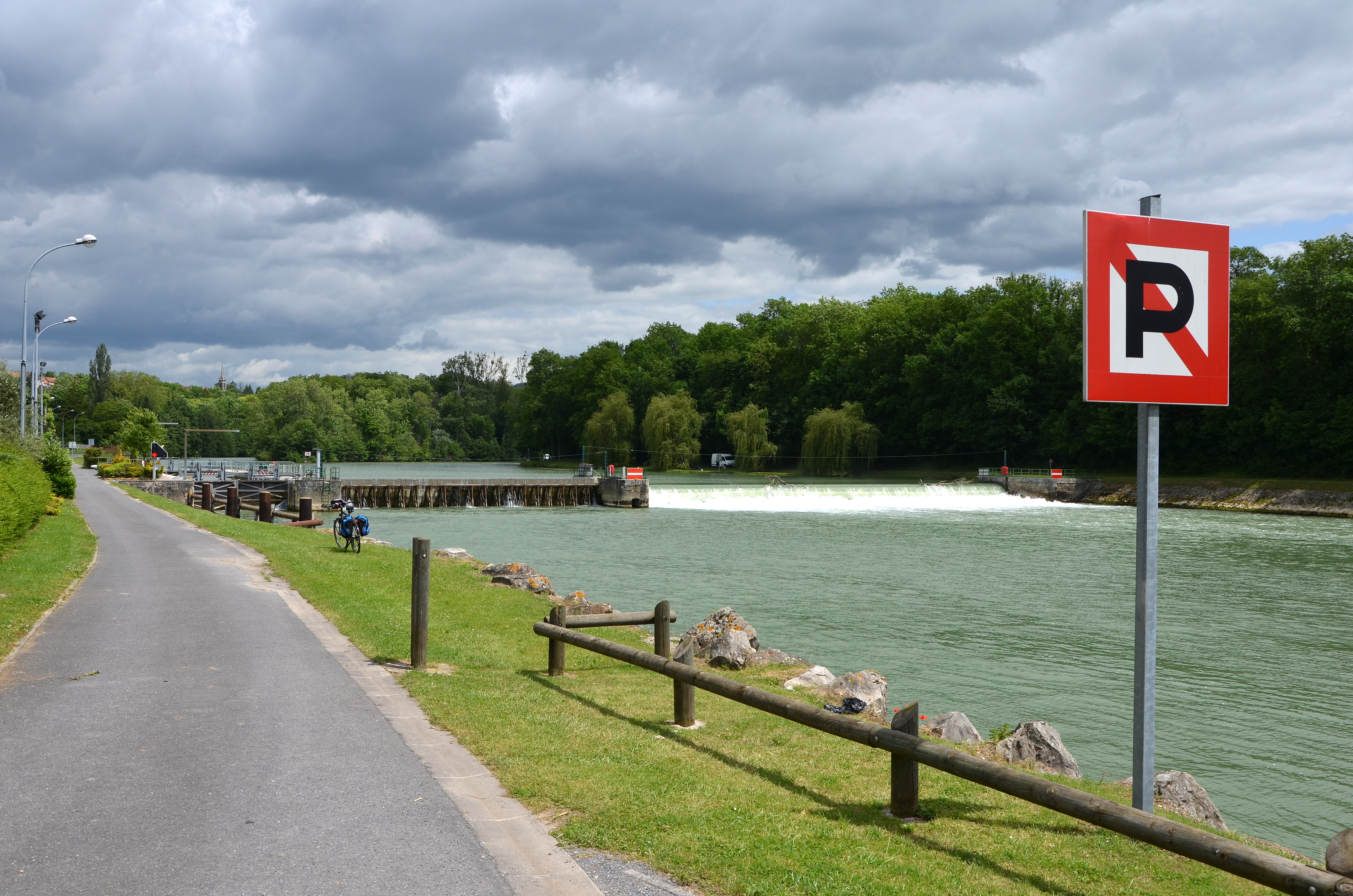 Écluse de Mont Saint Père sur la Marne, Aisne, France